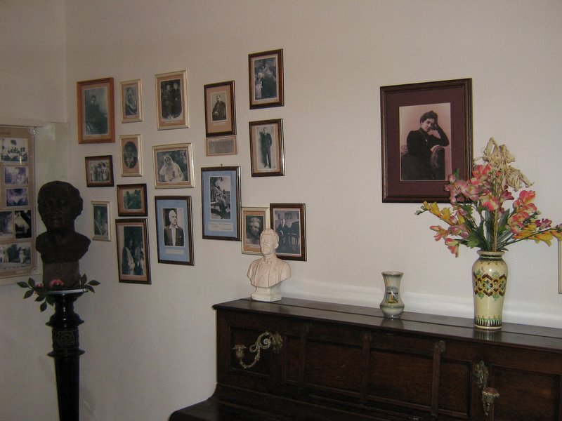 експозиція музею